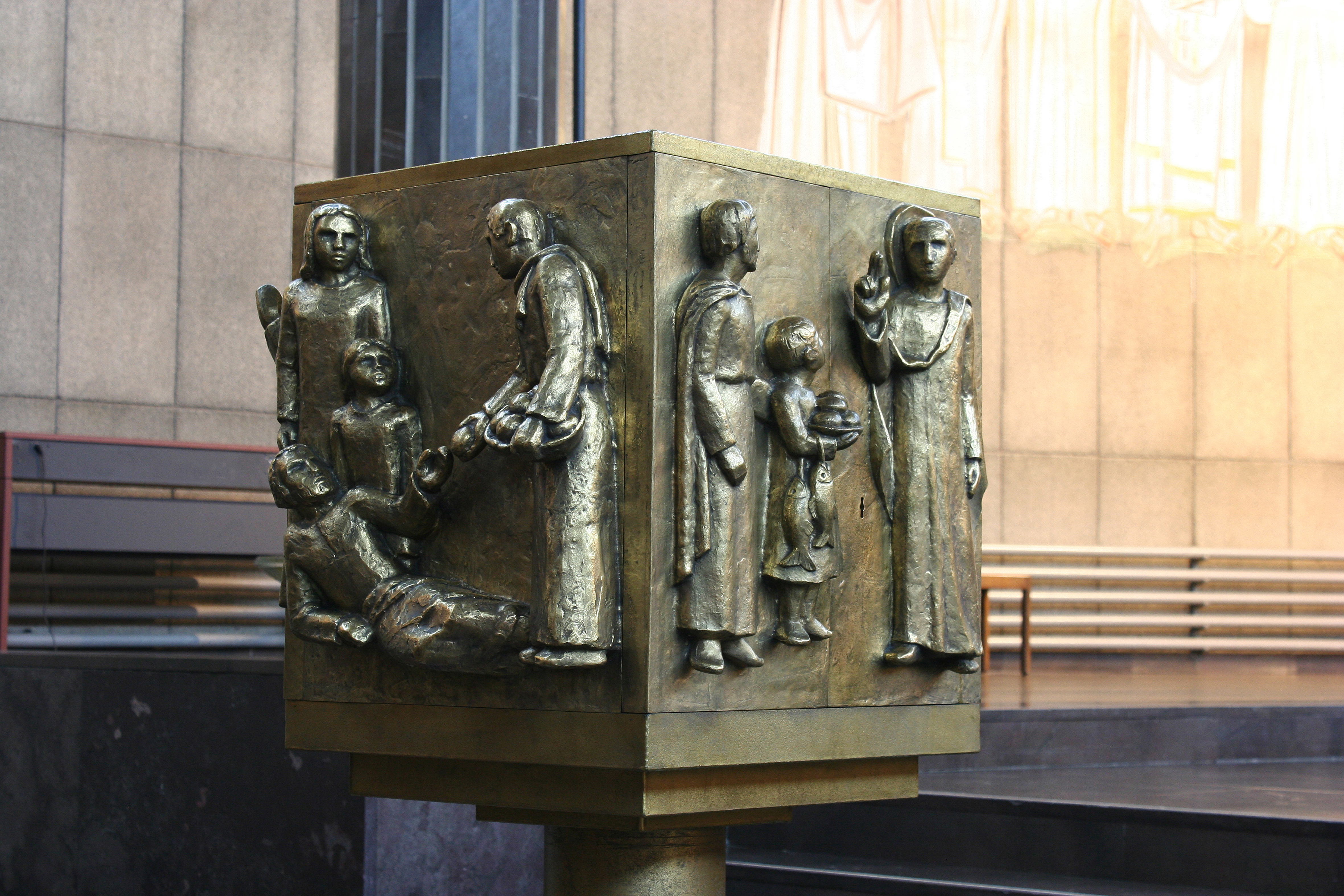 Römisch-katholische Pfarrkirche Sankt Karl Luzern, Tabernakel von Albert Schilling